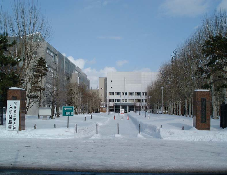 北海道工業大学 正門（2002年2月上旬 投稿者が撮影） Category:大学の画像 Category:手稲区の画像